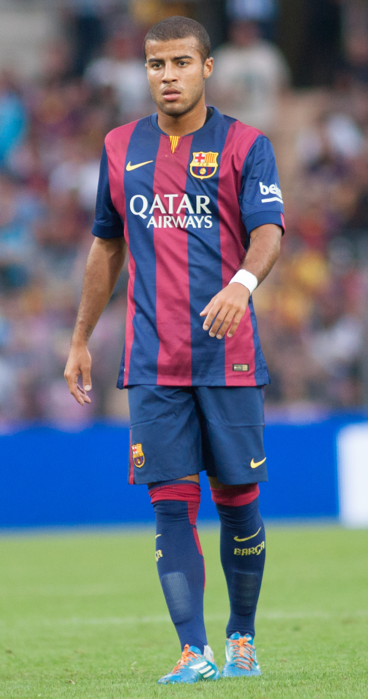 Naples vs Barcelone - Genève - aout 2014 - Rafael Alcántara